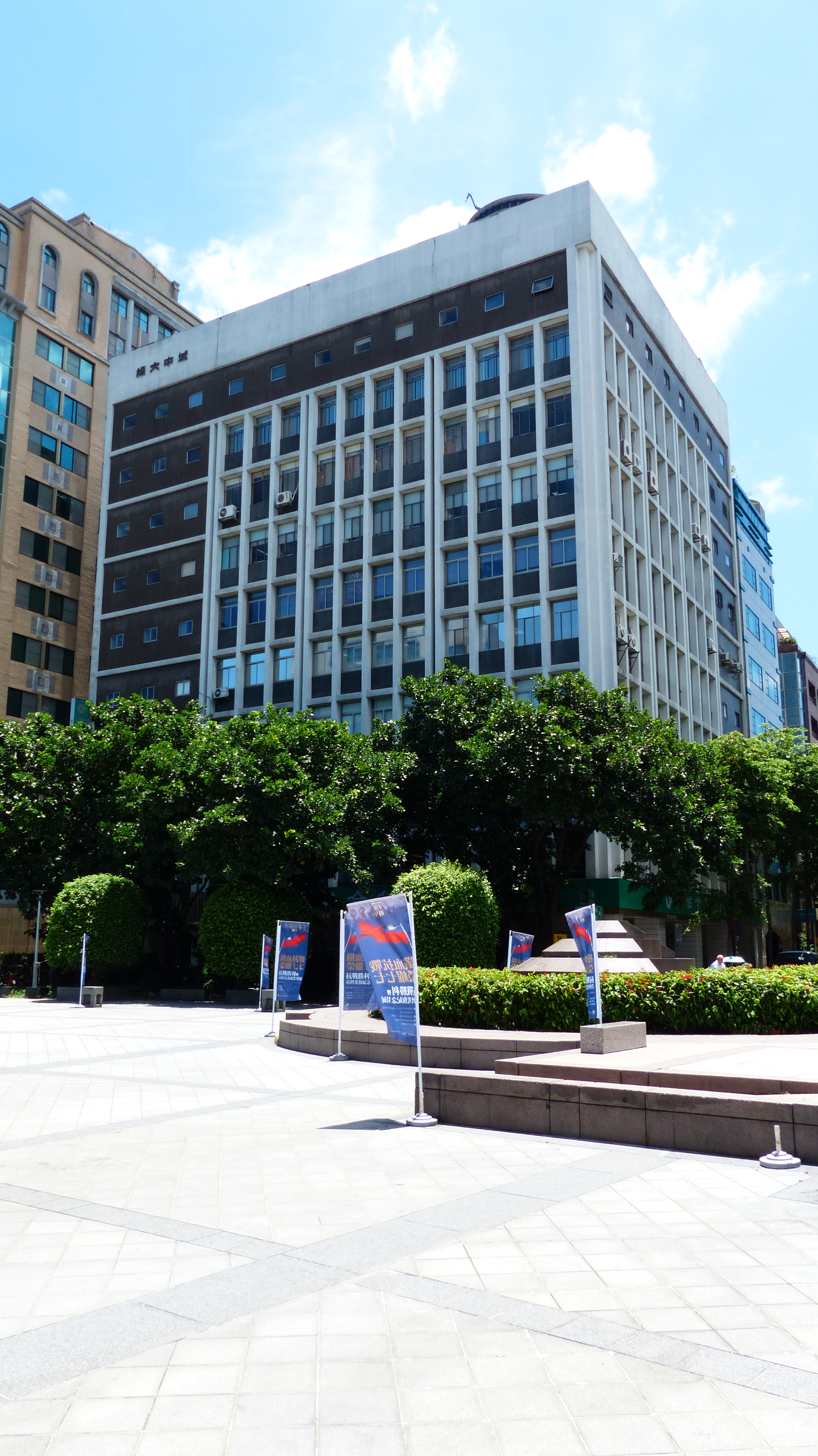 位於臺北市中山堂對面的城中大樓，1972年至1999年間是臺灣證券交易所股份有限公司總部所在，2016年現在臺灣網路認證股份有限公司總部設於本棟10樓，臺灣證券市場成長期盛衰榮枯的舞臺。地址：臺北市中正區延平南路85號、永綏街7號。